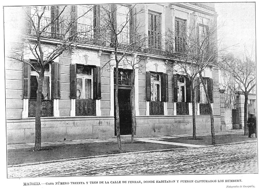 Calle Ferraz n.º 33, fotografía de Manuel Compañy, en la revista La Ilustración Española y Americana.